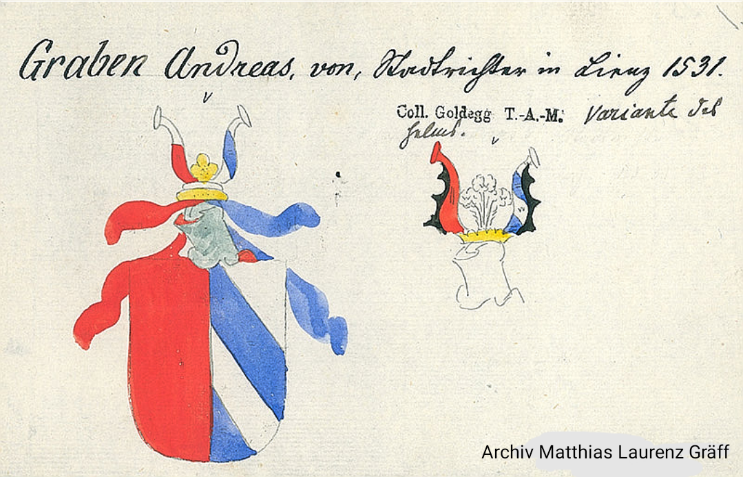 Wappen Andreas von Graben. 1531. Stadt- und Landrichter von Lienz (gest. 1560 in Lienz, Tirol). Archiv Matthias Laurenz Gräff (aus der Adelswappensammlung Berchtold Innsbruck Tiroler Landesarchiv)